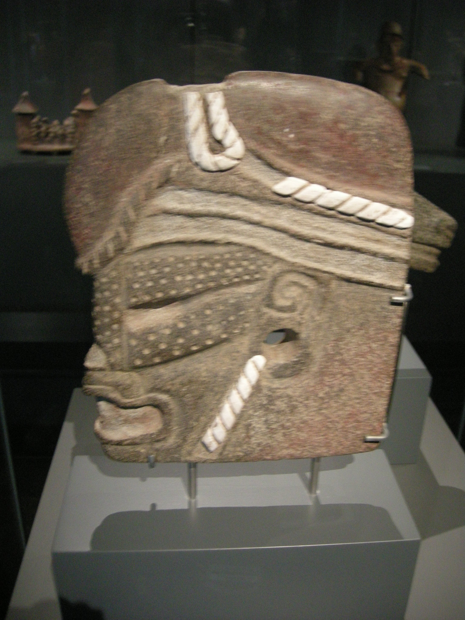 Ngv, maya, guatemala, hacha come testa umana, 600-900 dc